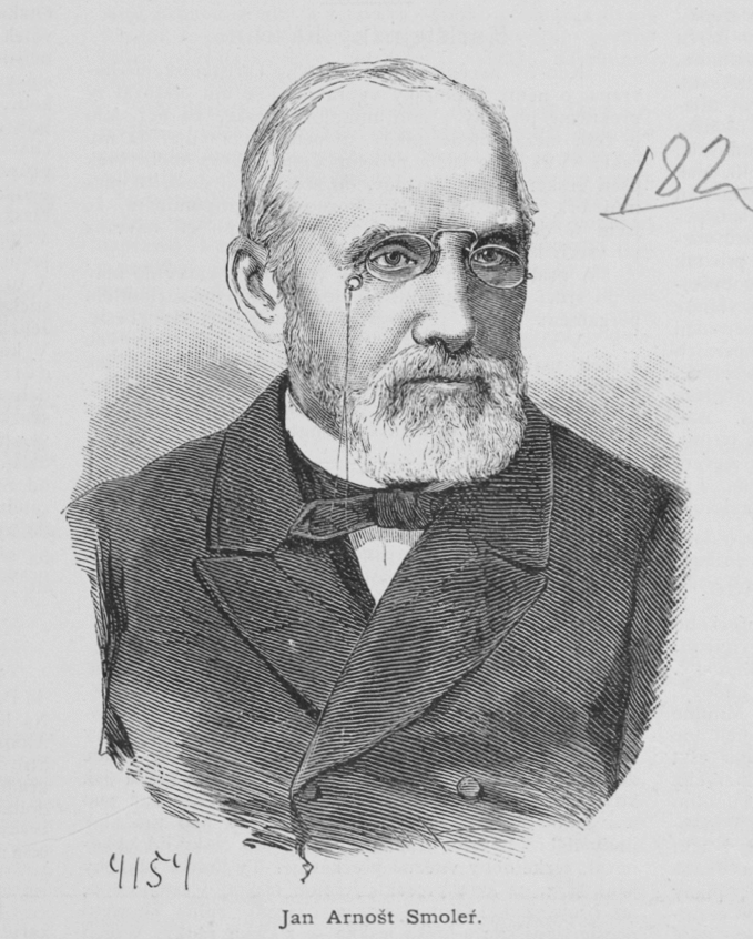 Hornjoserbsce: Portret Jana Arnošta Smolerja – serbski filolog, spisowaćel a nakładnik.